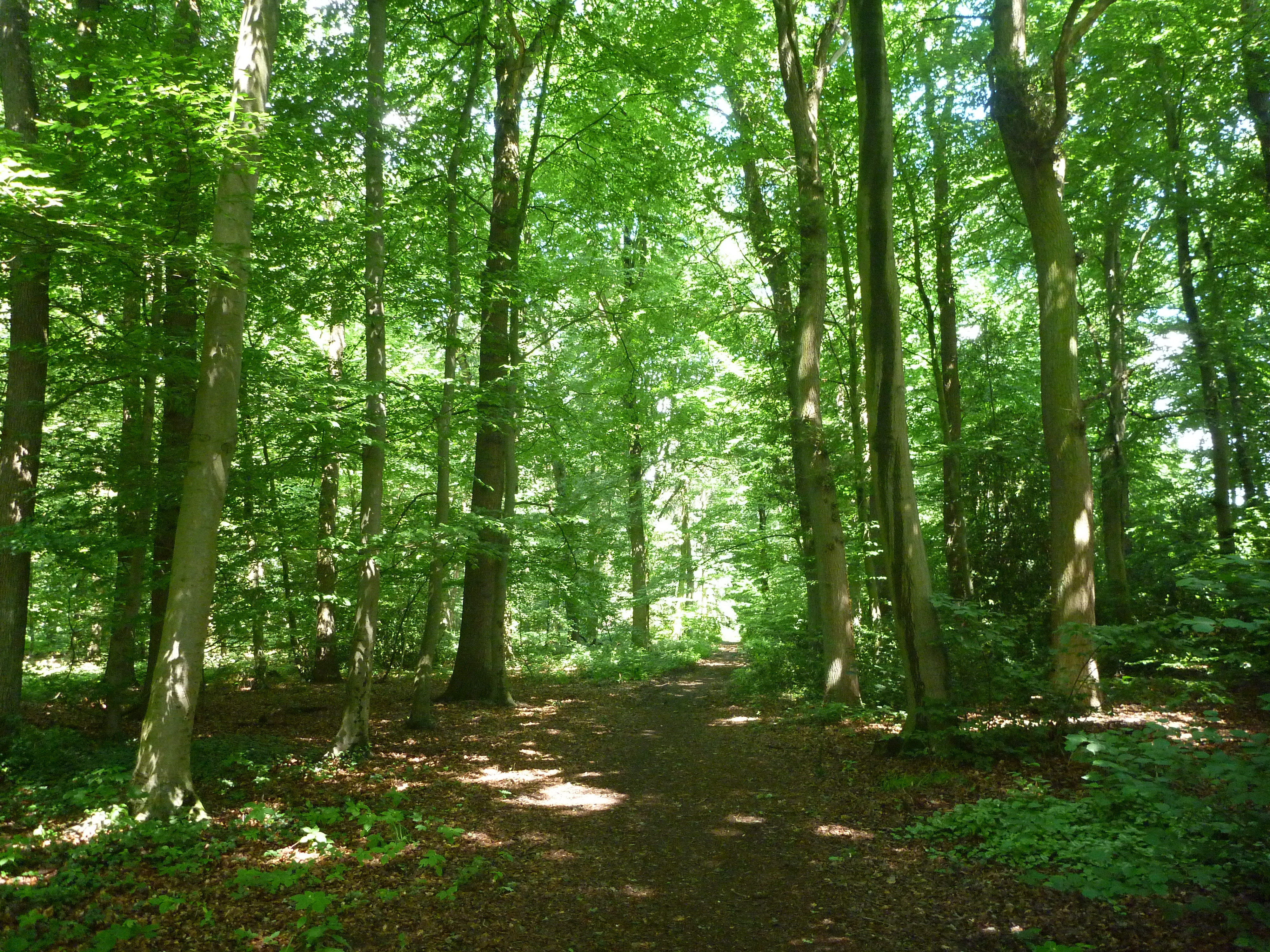 Osterhagen-Ihlpohl, Heumanns Busch